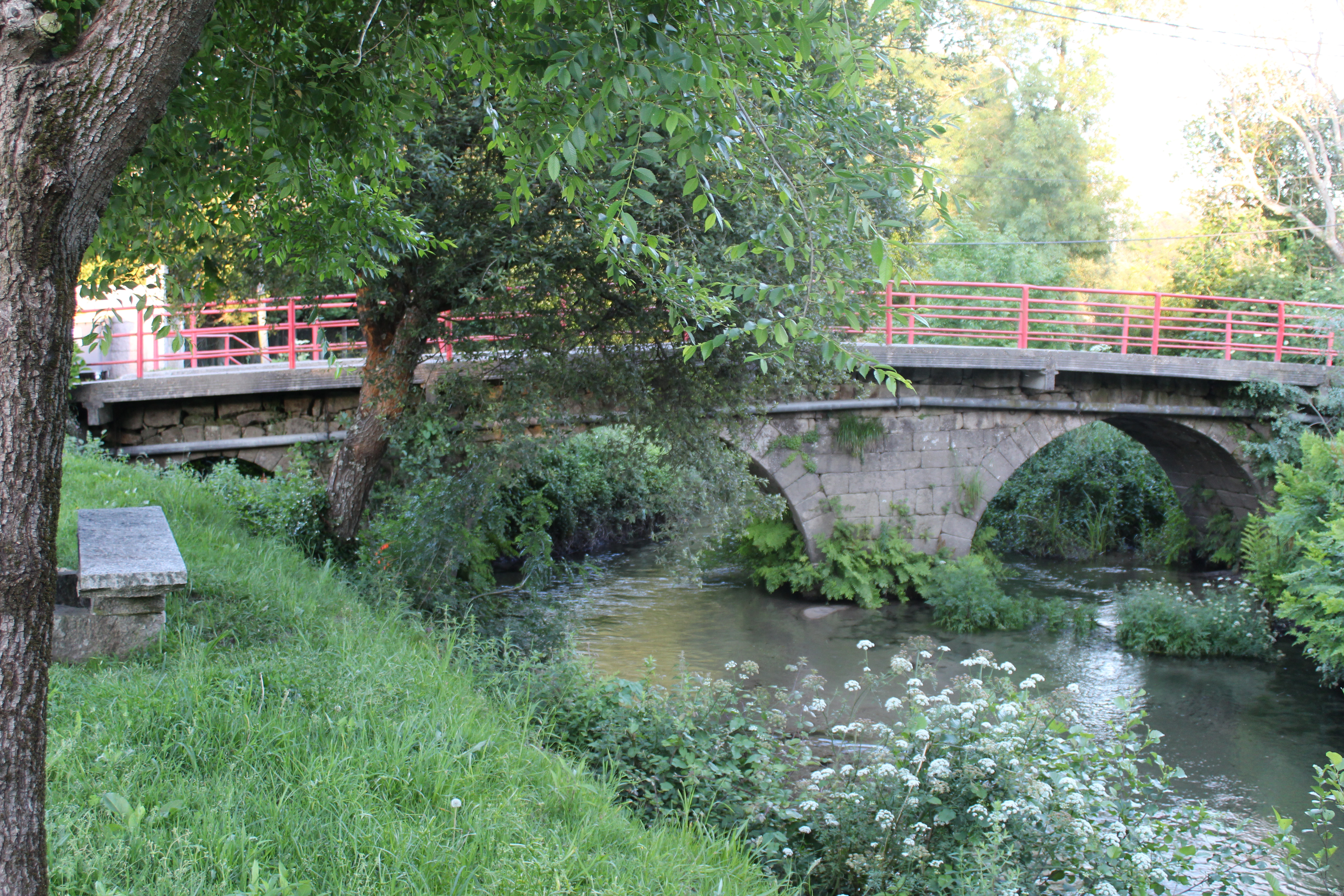 Núcleo urbano da Ponte